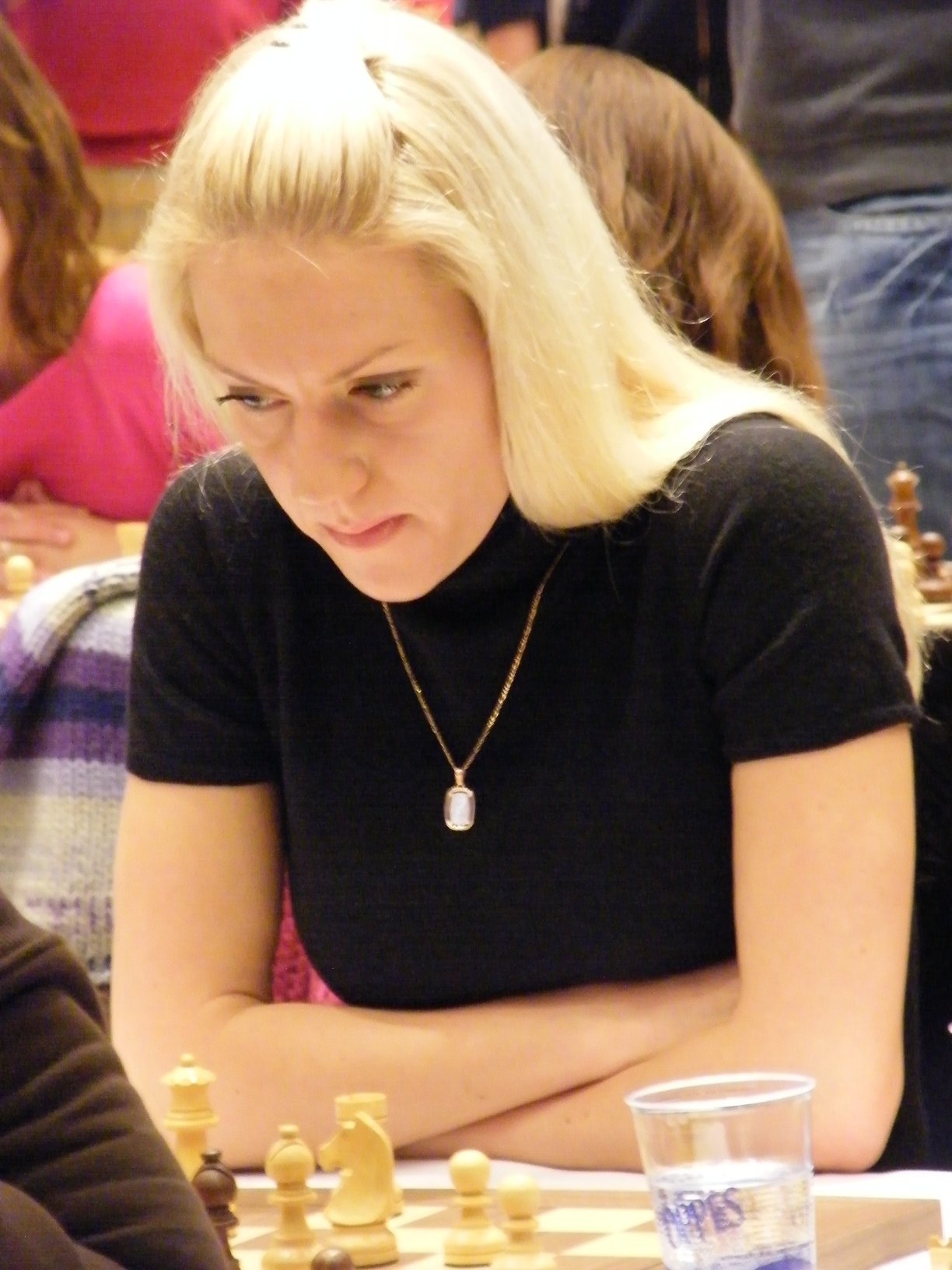 Беларуская (тарашкевіца): Ганна Шарэвіч на 38-й шахматнай Алімпіядзе ў Дрэздэне (2008)